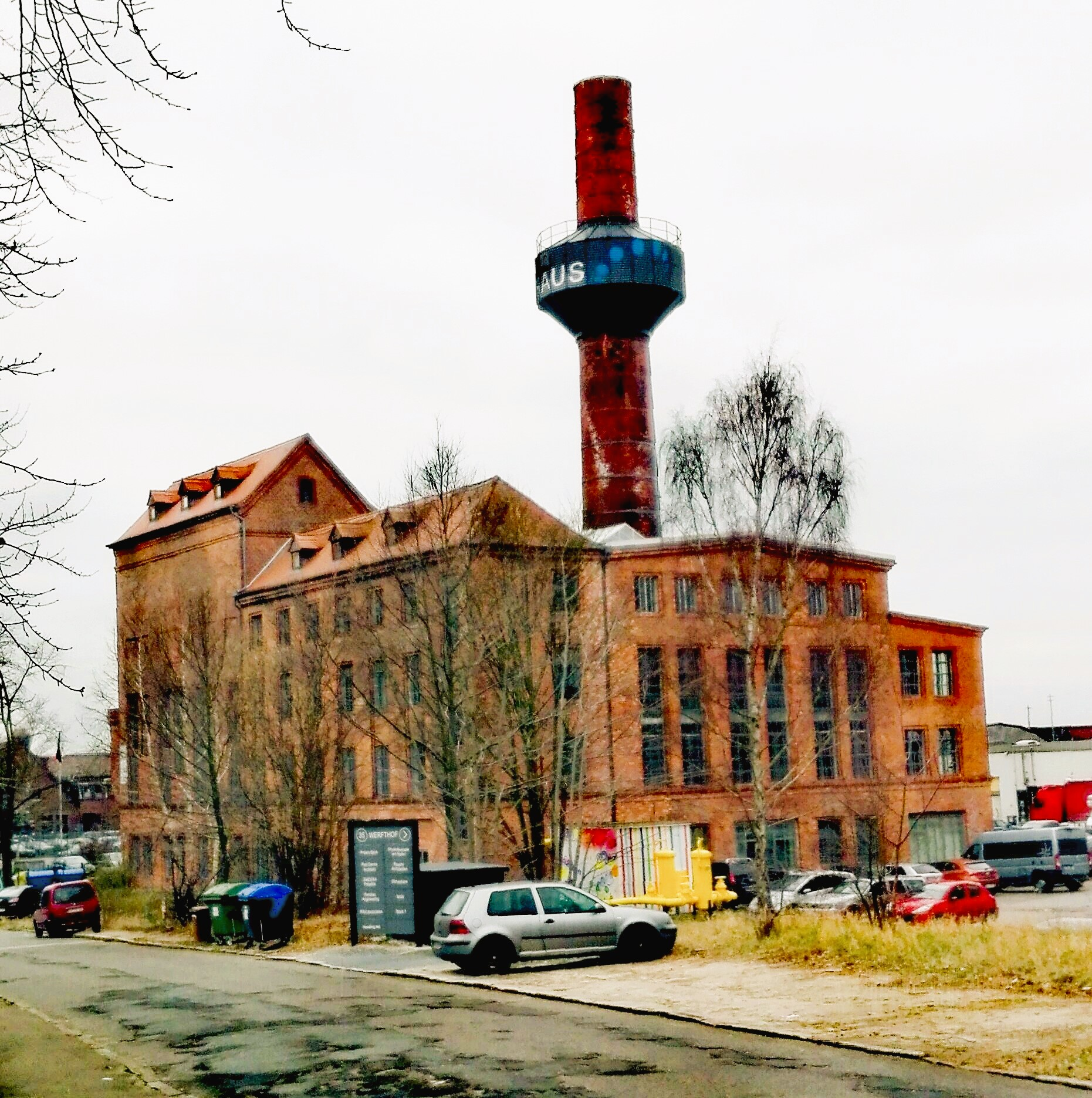 Die einstige Kraftzentrale der Schiffswerft von Henry Koch.